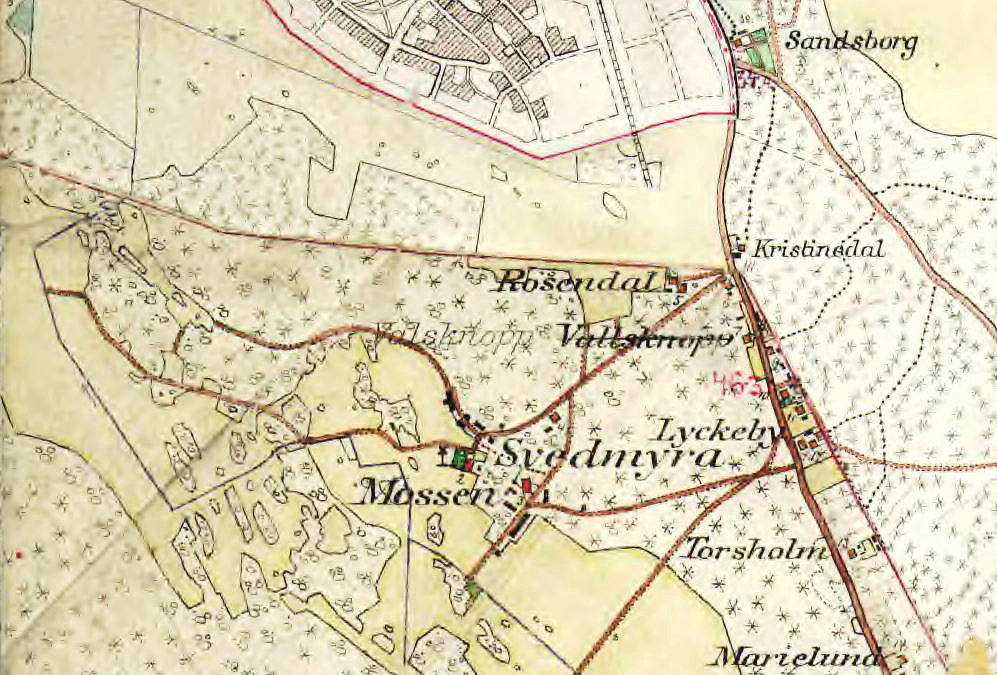 Svedmyra på Häradsekonomiska kartan